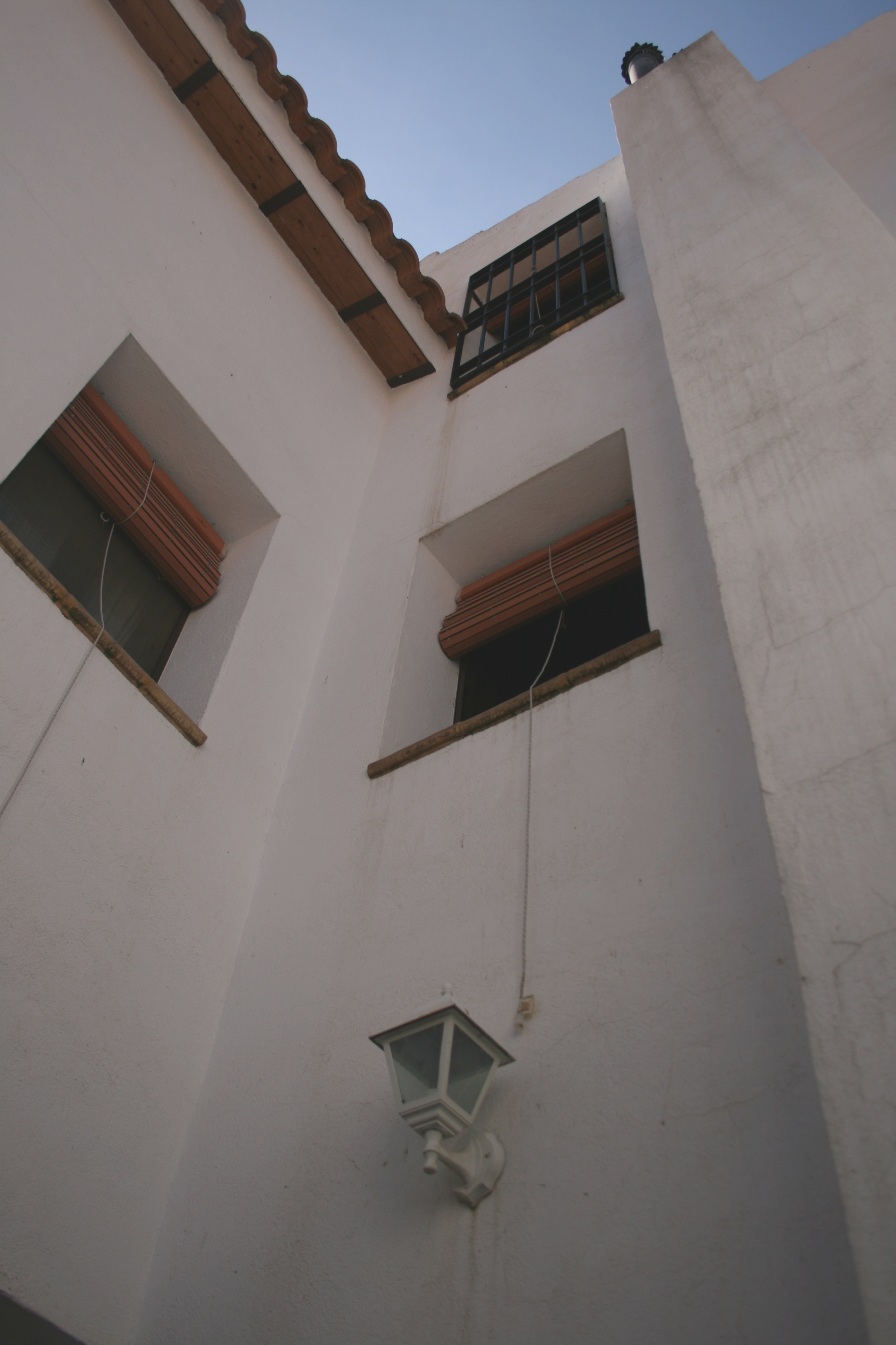 Casa en Cuenca